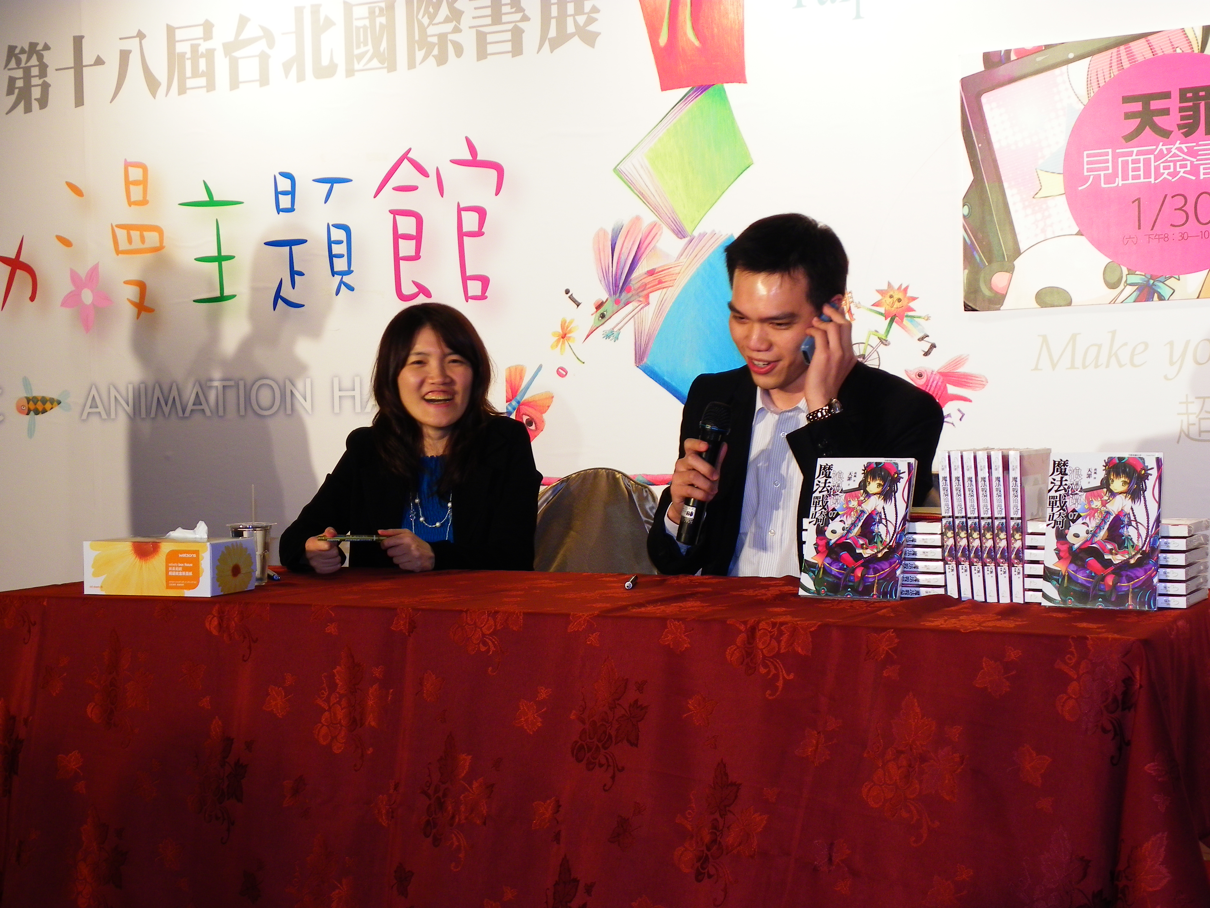 第十八屆臺北國際書展動漫主題館舉行之＜魔法戰騎浪漫譚＞第7卷簽書會中，用手機與書迷即時通話的天罪（右）與夜風（左）。